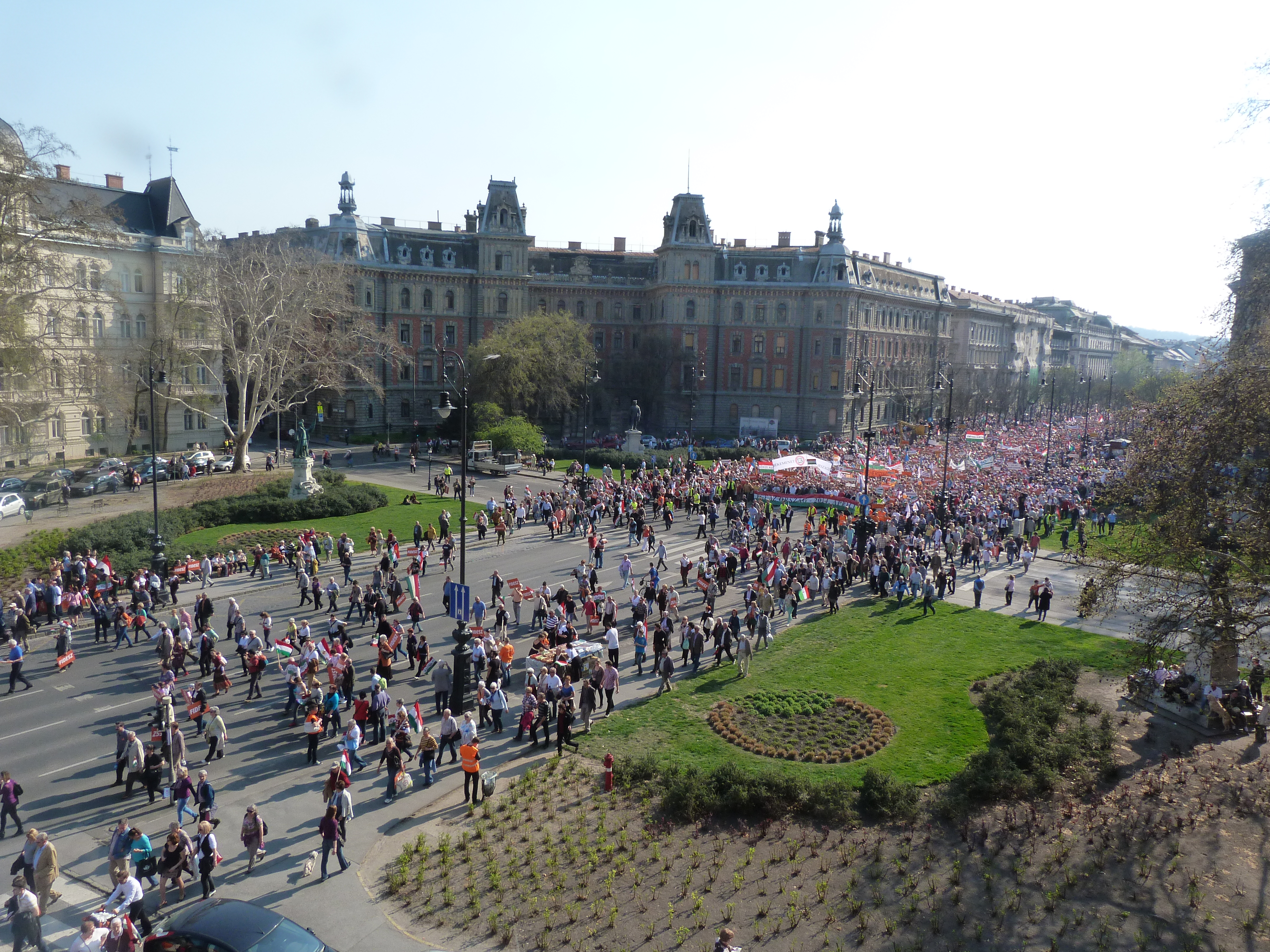 A felvételek 2014. március 29 –én szombaton készültek Budapesten, a Köröndön. A Kossuth térről indult a Békemenet, mely a Köröndön át jutott a Hősök teréig. A Hősök terén Joseph Daul, az Európai Néppárt elnöke, Pásztor István, a Vajdasági Magyar Szövetség elnöke és Orbán Viktor miniszterelnök tartott beszédet. Pozíció: Körönd az Andrássy út 94 szám II. emeleti, az Andrássy úthoz legközelebbi sarokerkélyől, a Hősök terén a FIDESZ Magyar Polgári Párt székhelyének első emeleti, Hősök tér felőli oldalon levő erkélyének Hősök tere felé eső végéről. ©© Derzsi Elekes Andor, Budapest, 2014, A kép és filmfelvételek egészben, vagy részletekben másolását, bármilyen úton történő sokszorosítását és felhasználását a szerző ellenérték nélkül, jogutódjaira is kihatóan megengedi. Az engedély kiterjed a kereskedelmi célú hasznosításra is. Kéri azonban nevének feltüntetését a felhasználás során. A Metapolisz sorozat valamennyi képe és filmje Creative Commons alatti valamint kereskedelmi - for profit - célra is felhasználható. Ajánlott hivatkozás: Derzsi Elekes Andor: Metapolisz DVD line